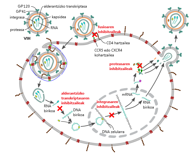 GIBaren aurka erabiltzen diren lau antirretrobiral multzo handien akzio-mekanismoak: fusioaren inhibitzaileak, alderantzizko transkriptasaren inhibitzaileak, integrasaren inhibitzaileak eta proteasaren inhibitzaileak.